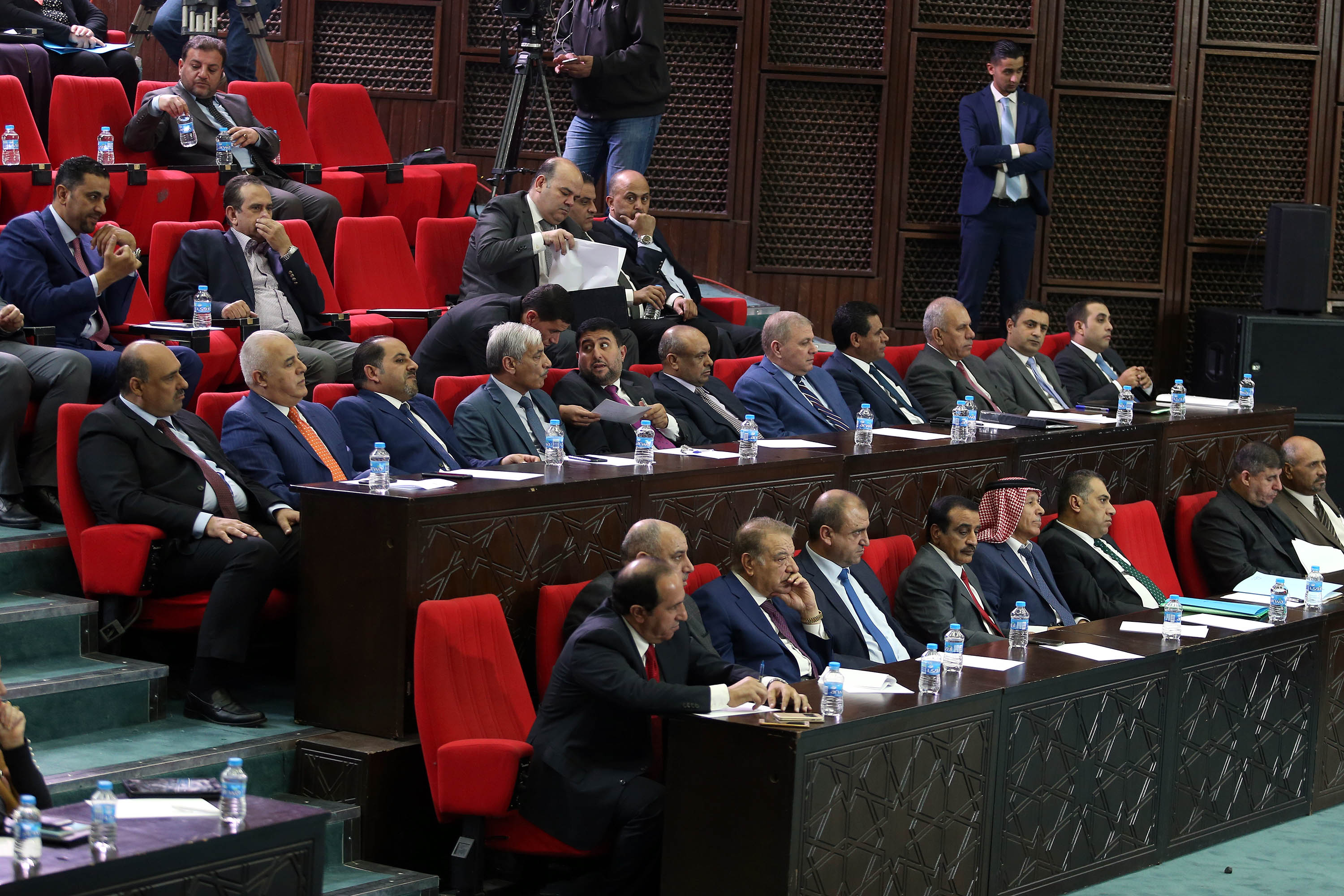 جلسة مجلس النواب الأردني بخصوص حادثة البحر الميت يوم 5/11/2018